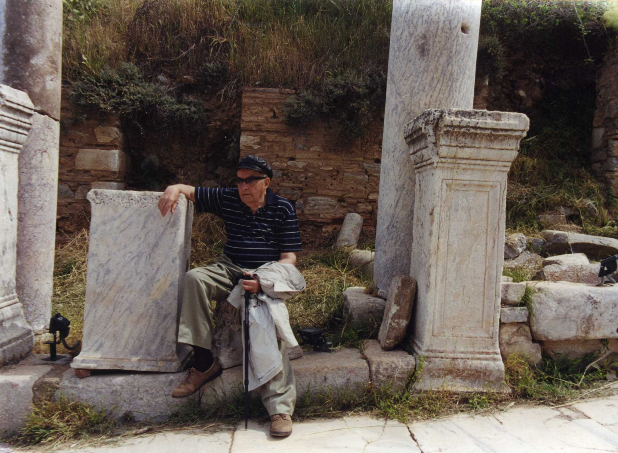 Giuseppe Masi durante un viaggio in Turchia